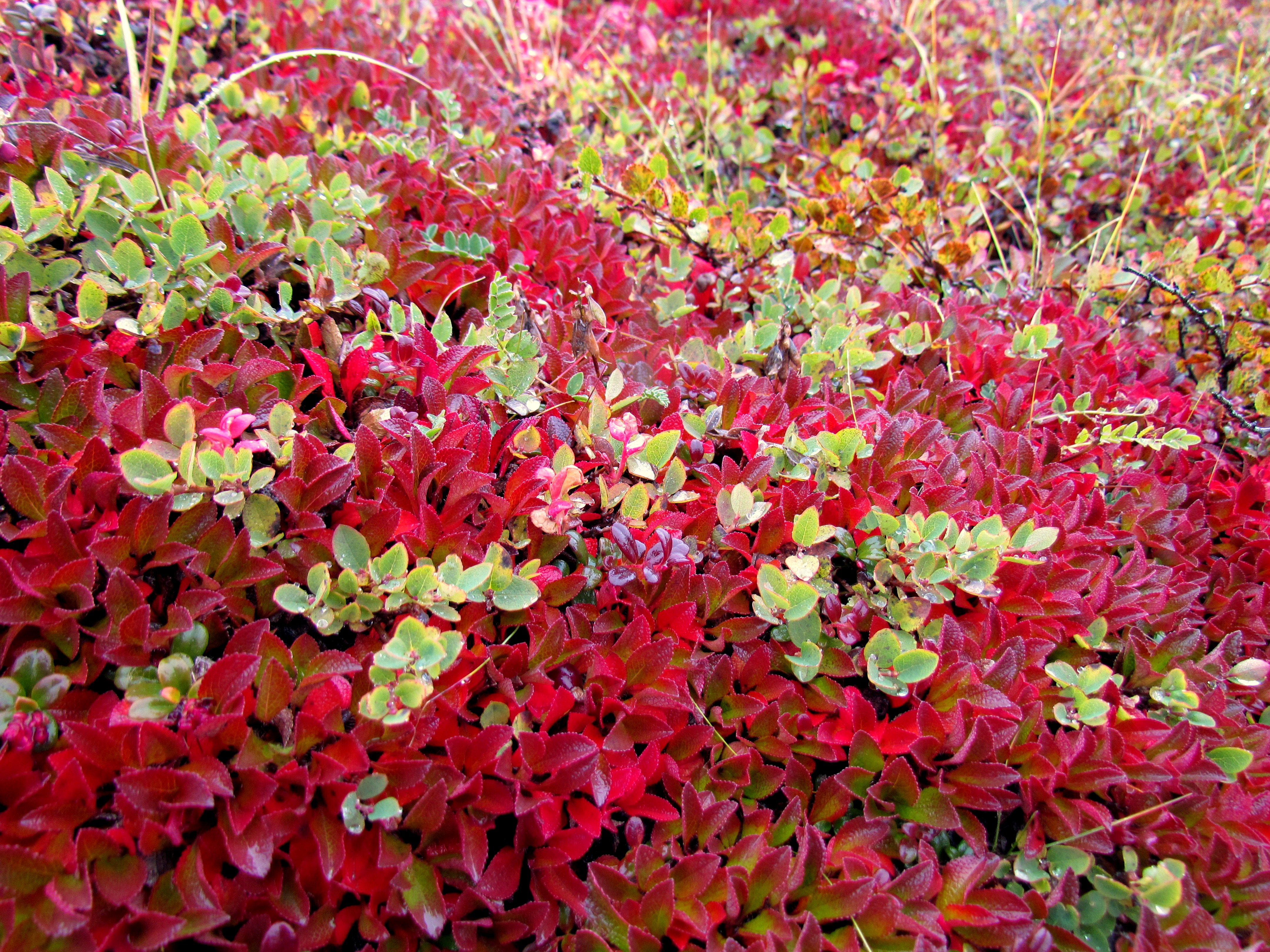 Nunavut tundra